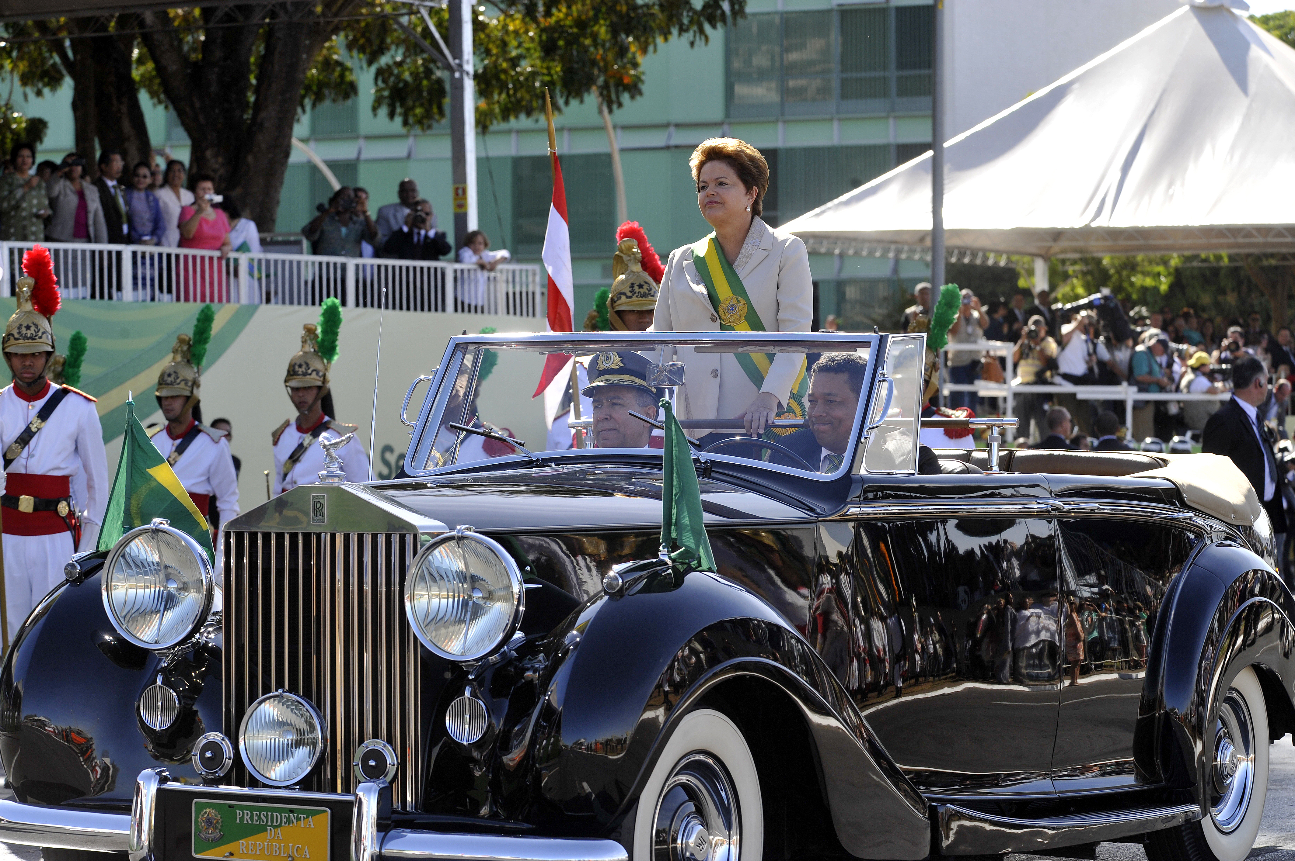 Brasília, 07/09/2012 Foto: Felipe Barra